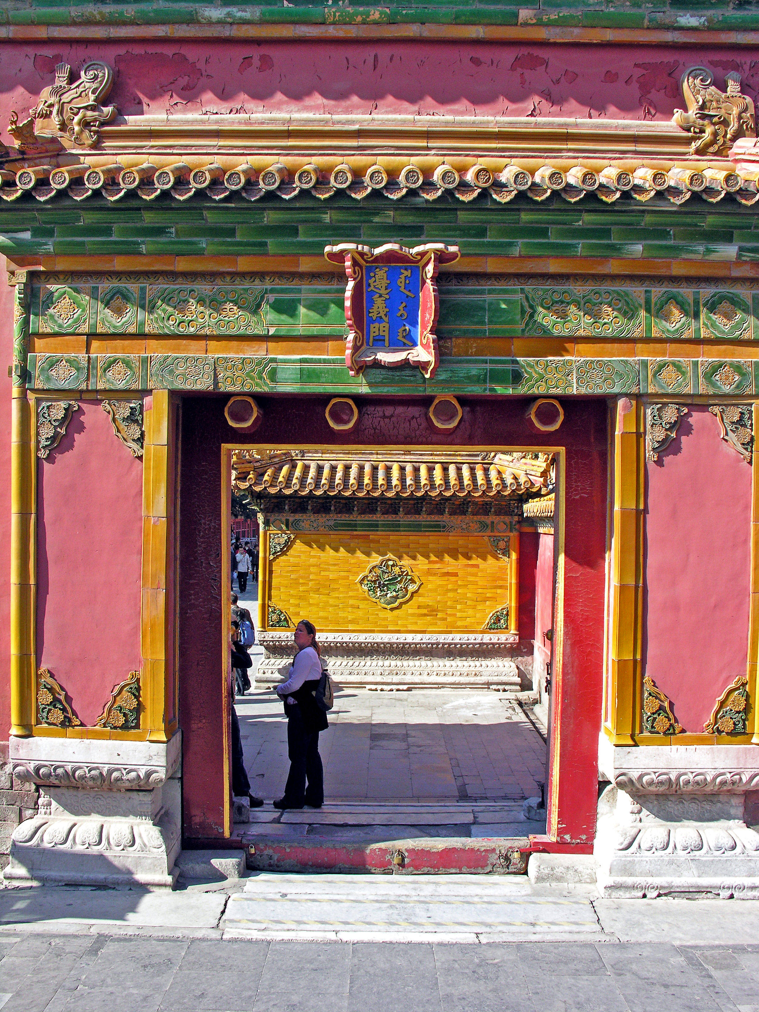 China-6232